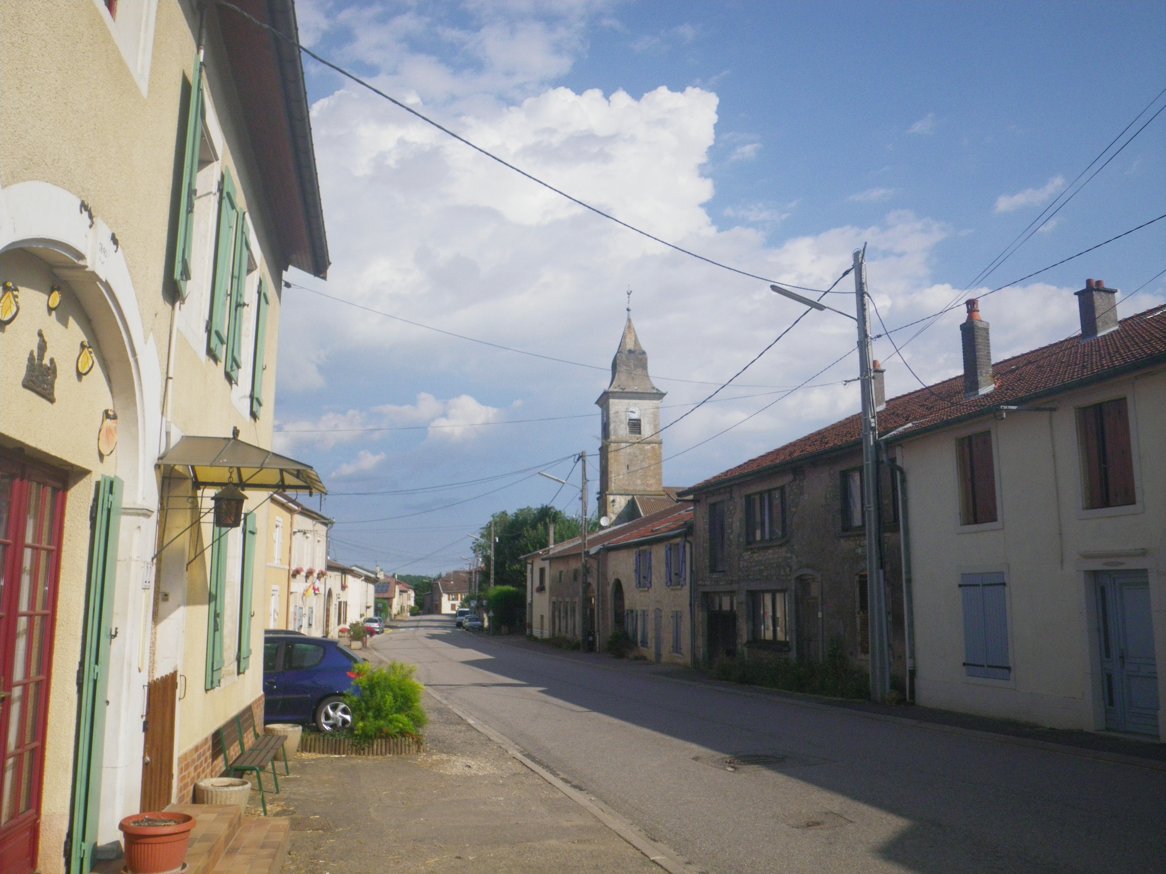 Crépey